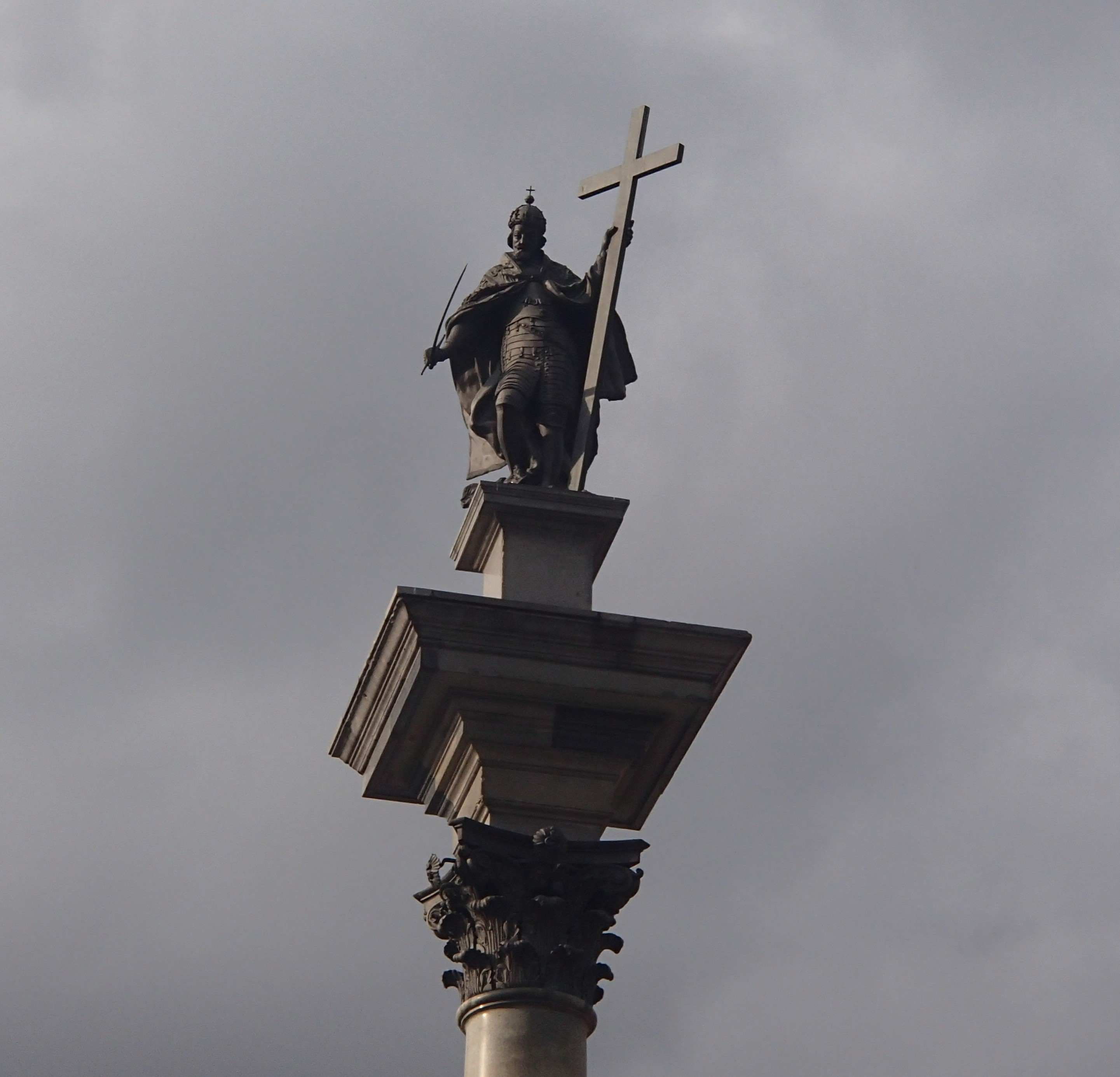 Bliski widok na figurę Zygmunta III Wazy